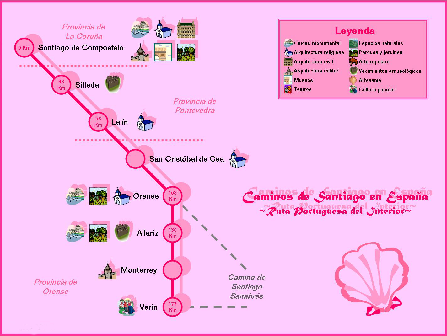 Caminos de Santiago en España: Ruta Portuguesa del Interior